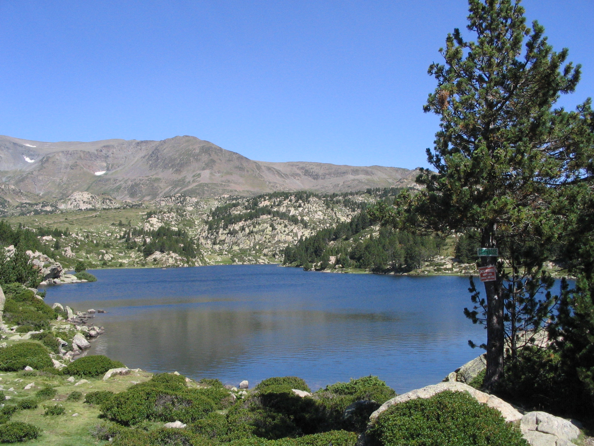 Photo de l'Estany de la Comassa